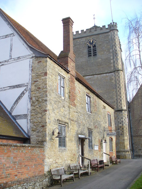 Dorchester Abbey Museum